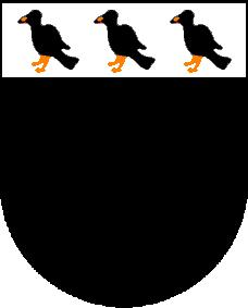 Reproduit par Chokotoff, d'après les armes de Woluwe-Saint-Lambert